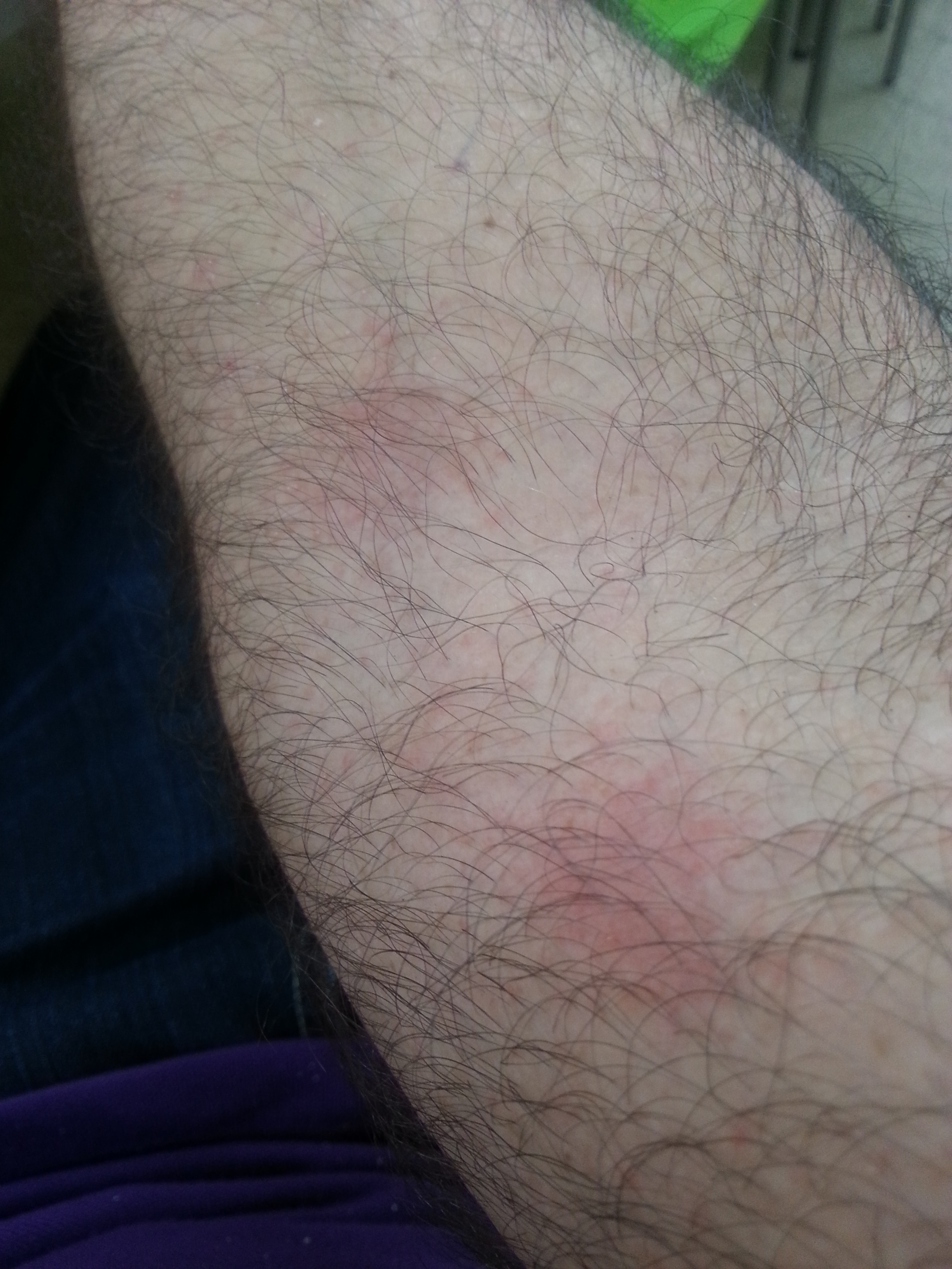 תגובה אלרגית מקומית, 2015